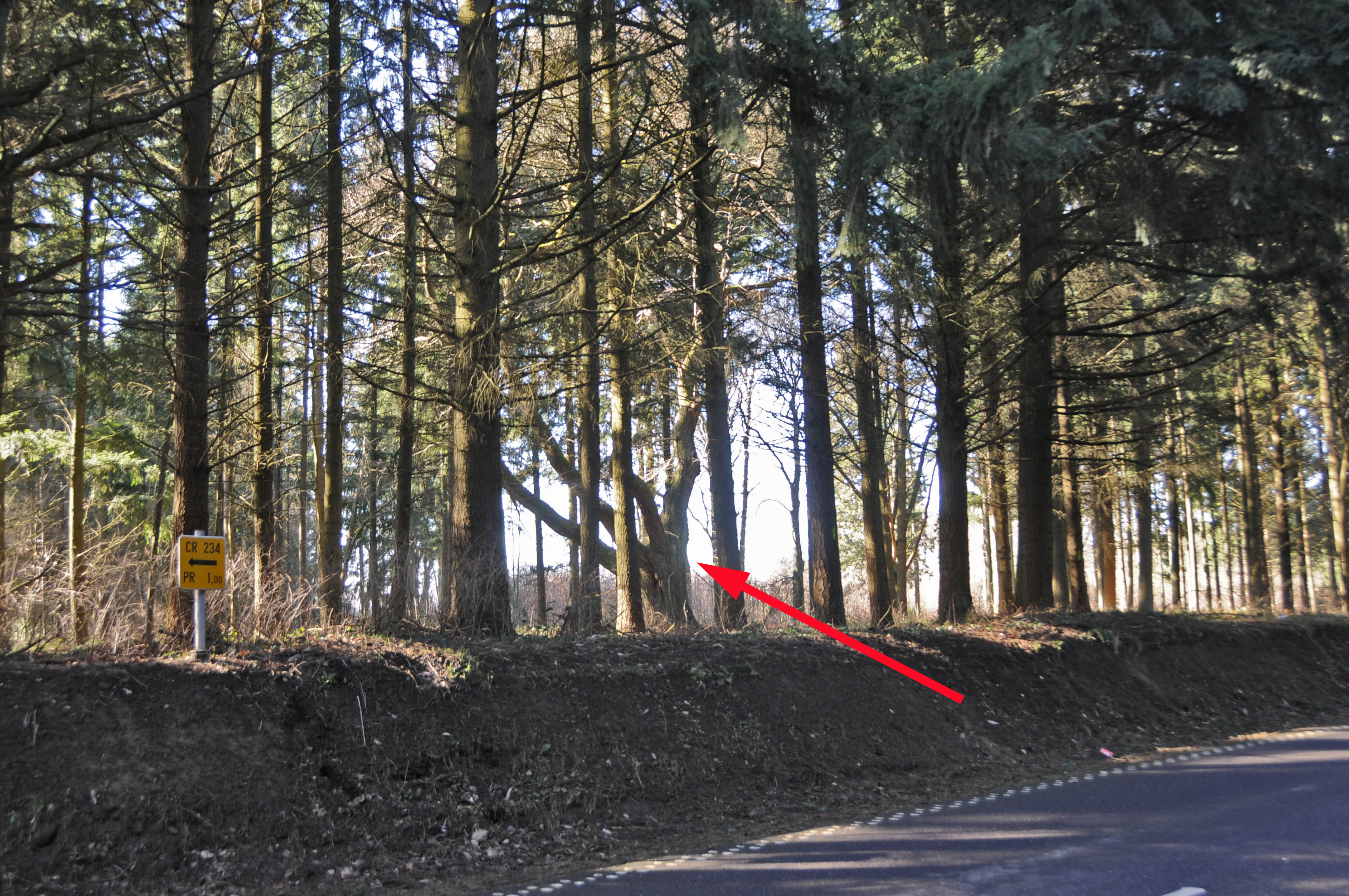 Séisskäschtebam um Scheedhaff.